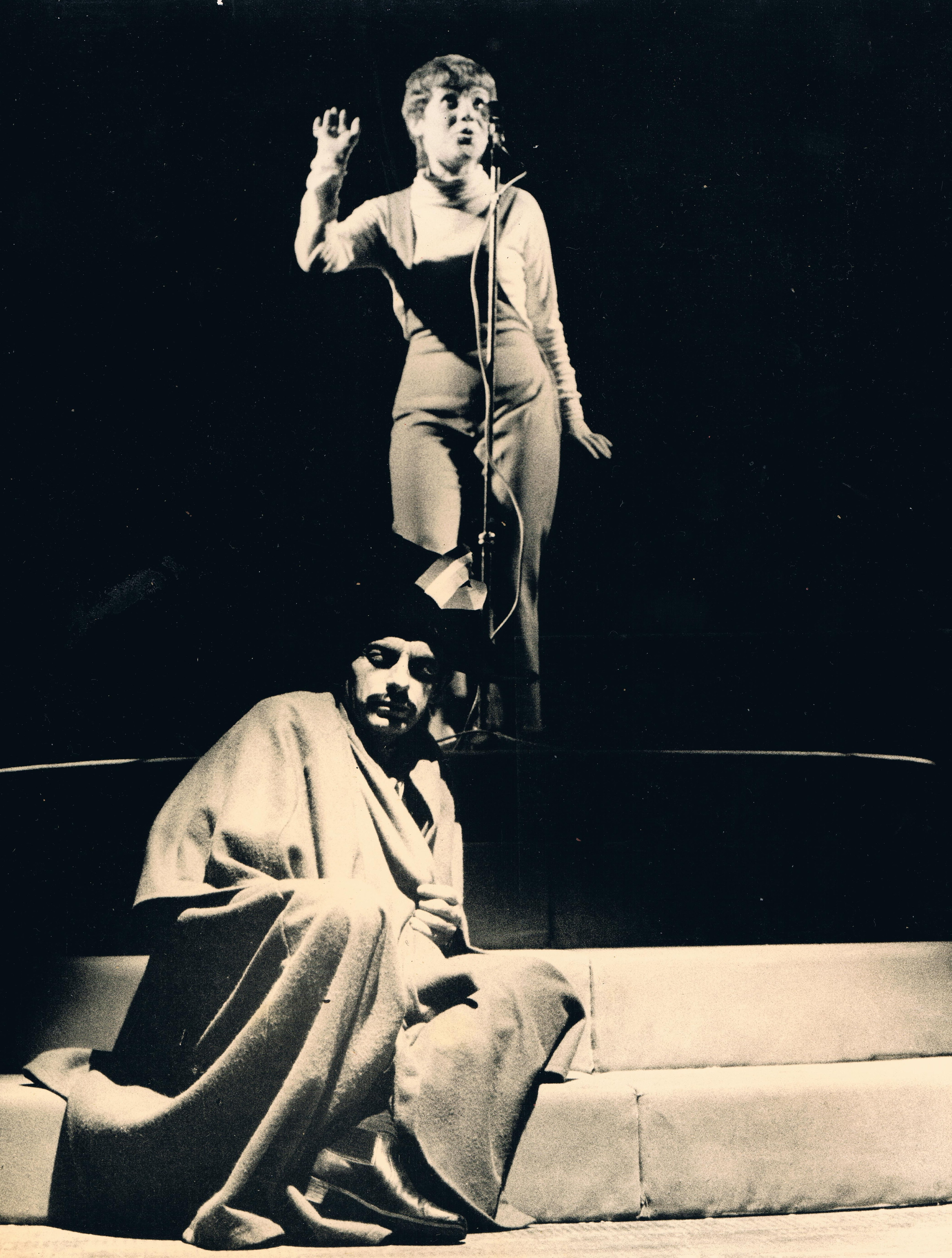 גליה ישי בהצגה "נפוליאון חי או מת"